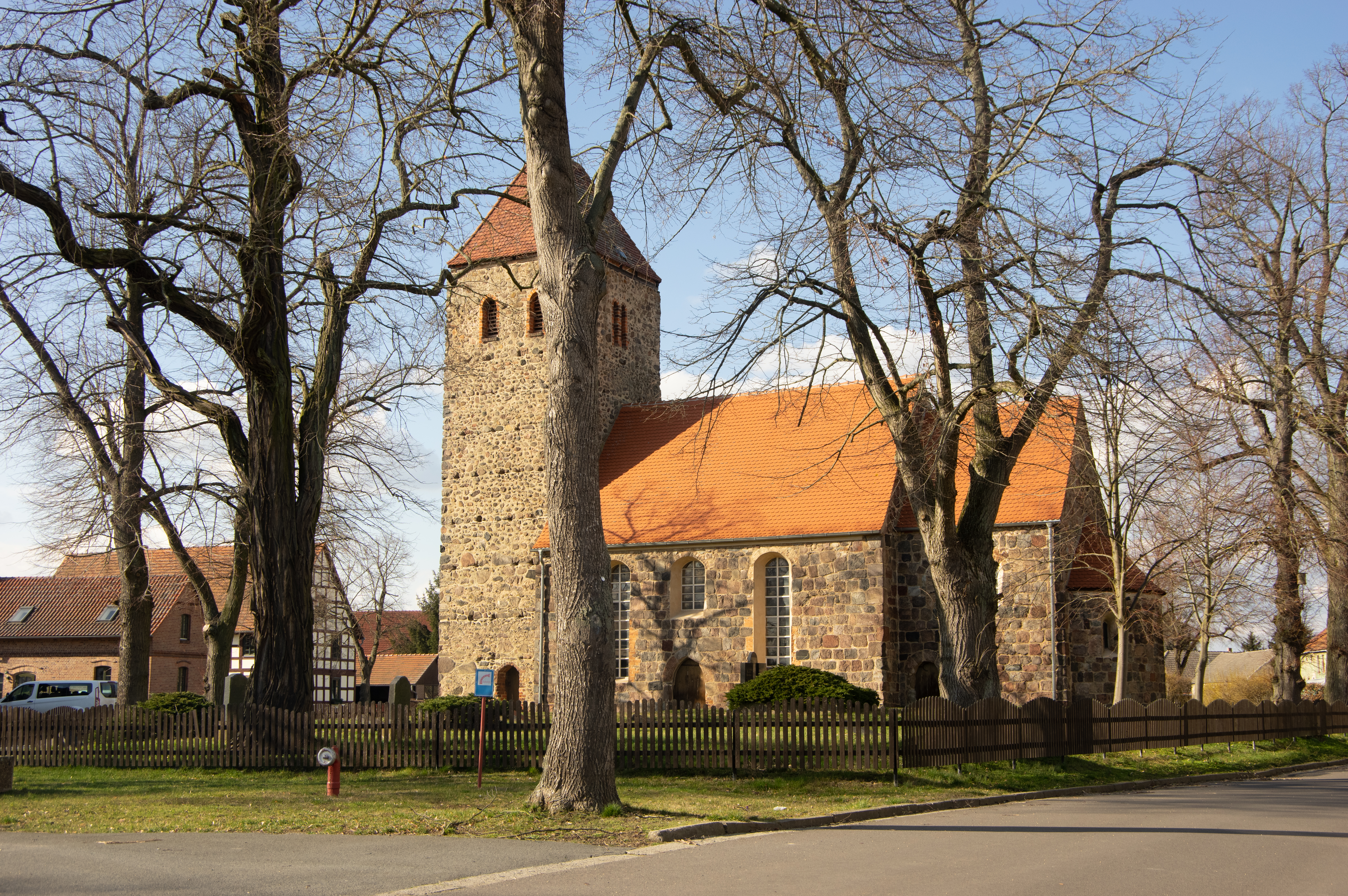 Ihlow, Ortsteil Riethof in Brandenburg. Die Dorfkirche steht unter Denkmalschutz.